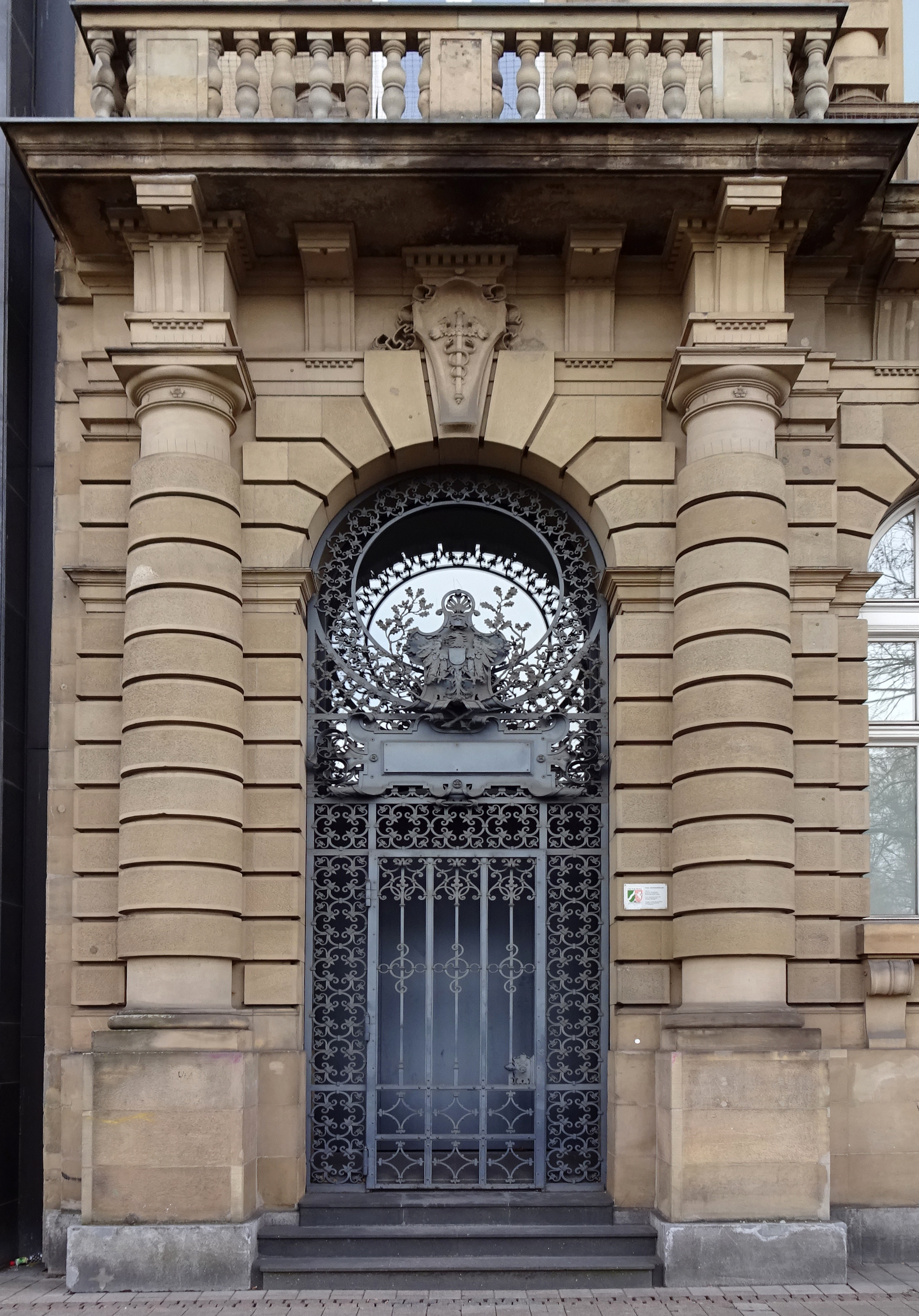 Ehemaliges Reichsbankgebäude, Heinrich-Heine-Allee 8-9, Portal links, Düsseldorf-Altstadt